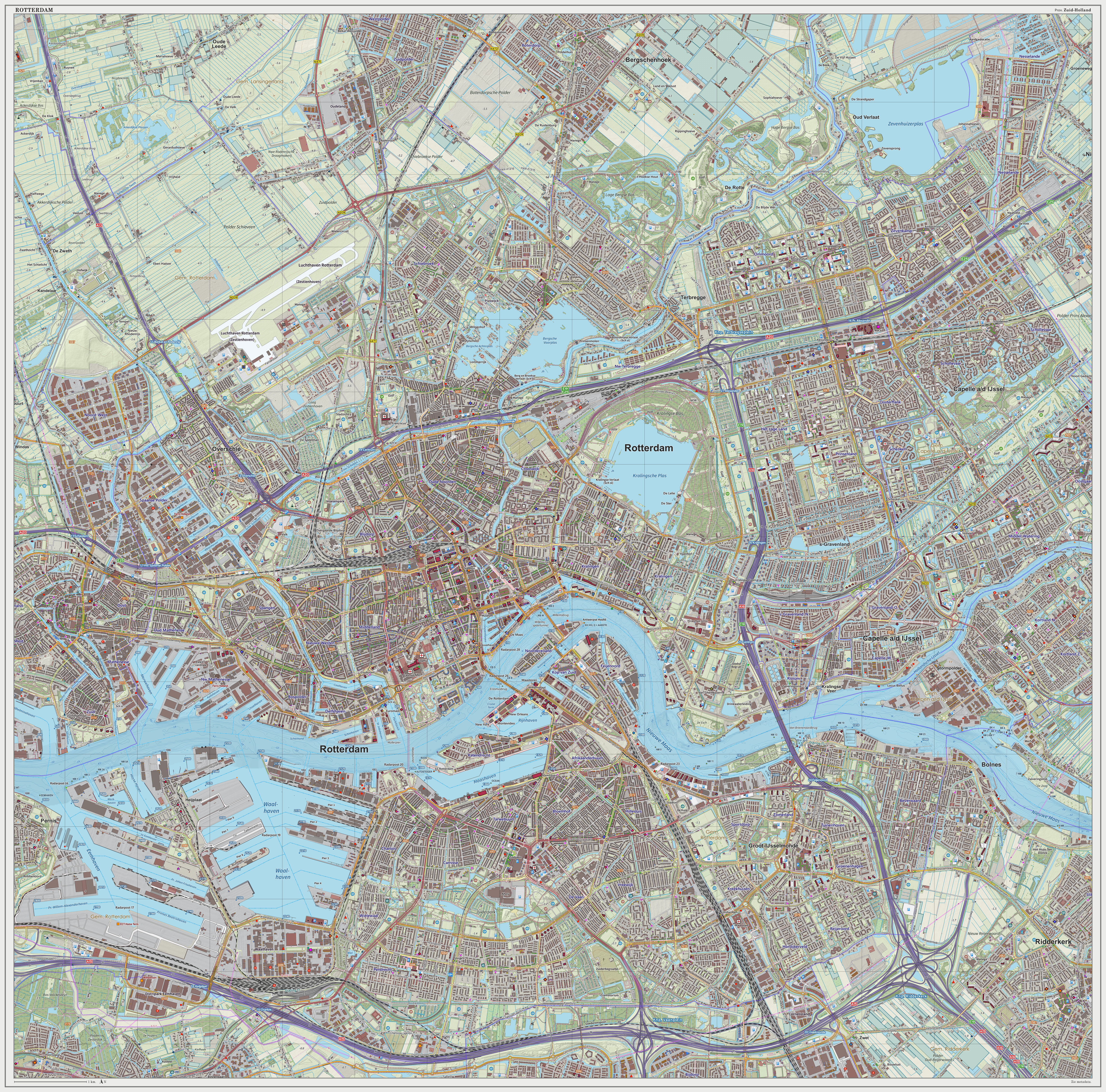 Topografische kaart van Rotterdam (woonplaats). Resolutie: 300 pixels/km. Kaartbeeld samengesteld uit de open geodata van de Top10NL en Top25namen (Basisregistratie Topografie, Kadaster), Creative Commons BY licentie. Gebouwvlakken uit open geodata BAG extract. Wegen uit de OpenStreetMap. Reliëfschaduw uit de Actuele Hoogtekaart AHN2. Samenstelling en kleurenschema: Jan-Willem van Aalst, met QGIS2. Zie ook de Legenda.